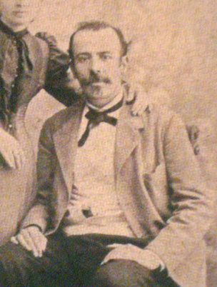 Antonio Machado Álvarez y su esposa Ana Ruiz